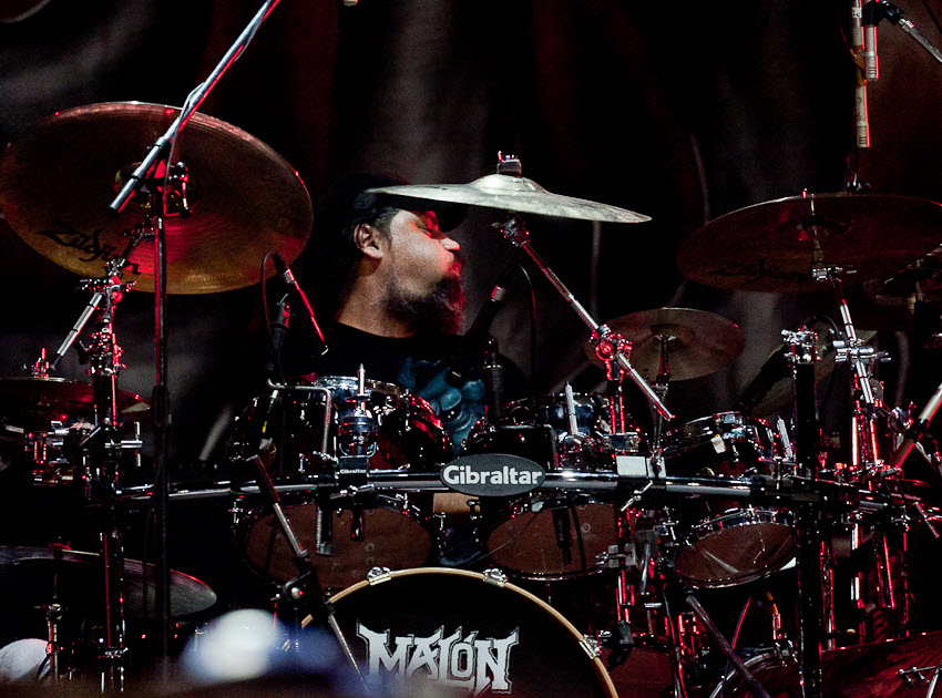 Claudio Strunz, baterista de Malón